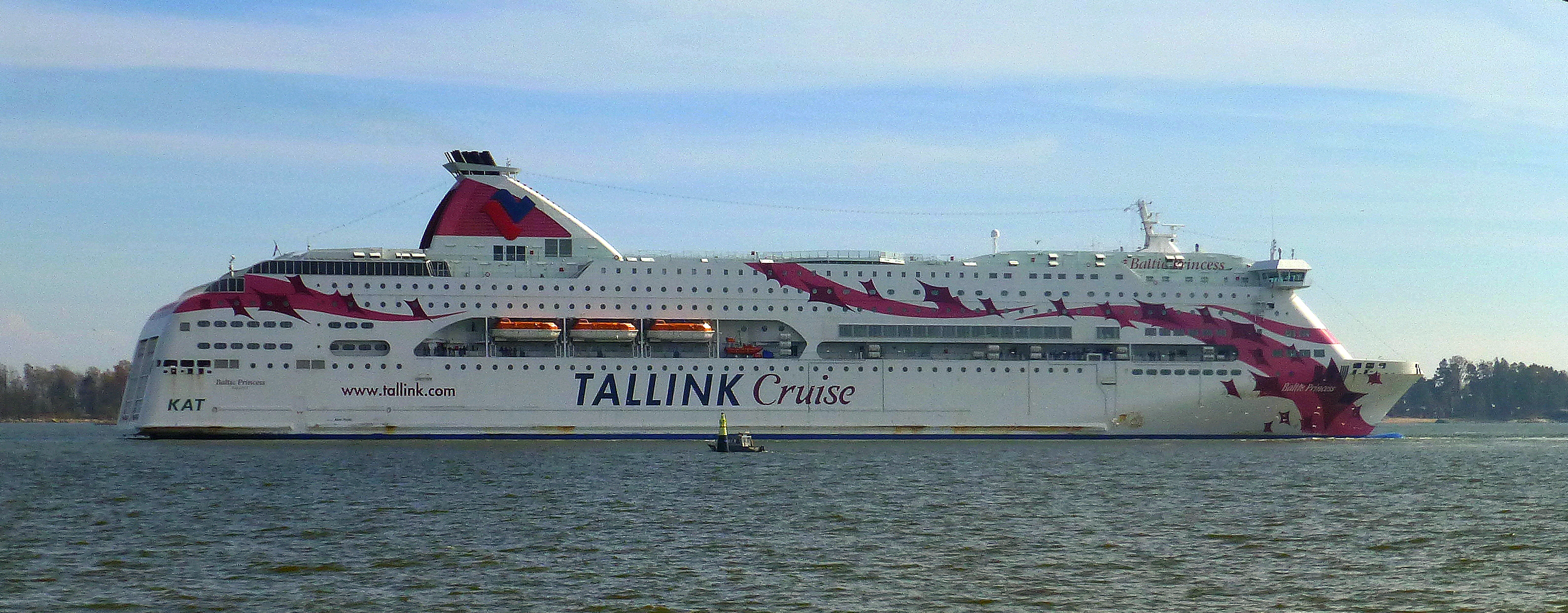 Tallink cruise close to Helsinki --- Tallink risteily lähellä Helsinkiin